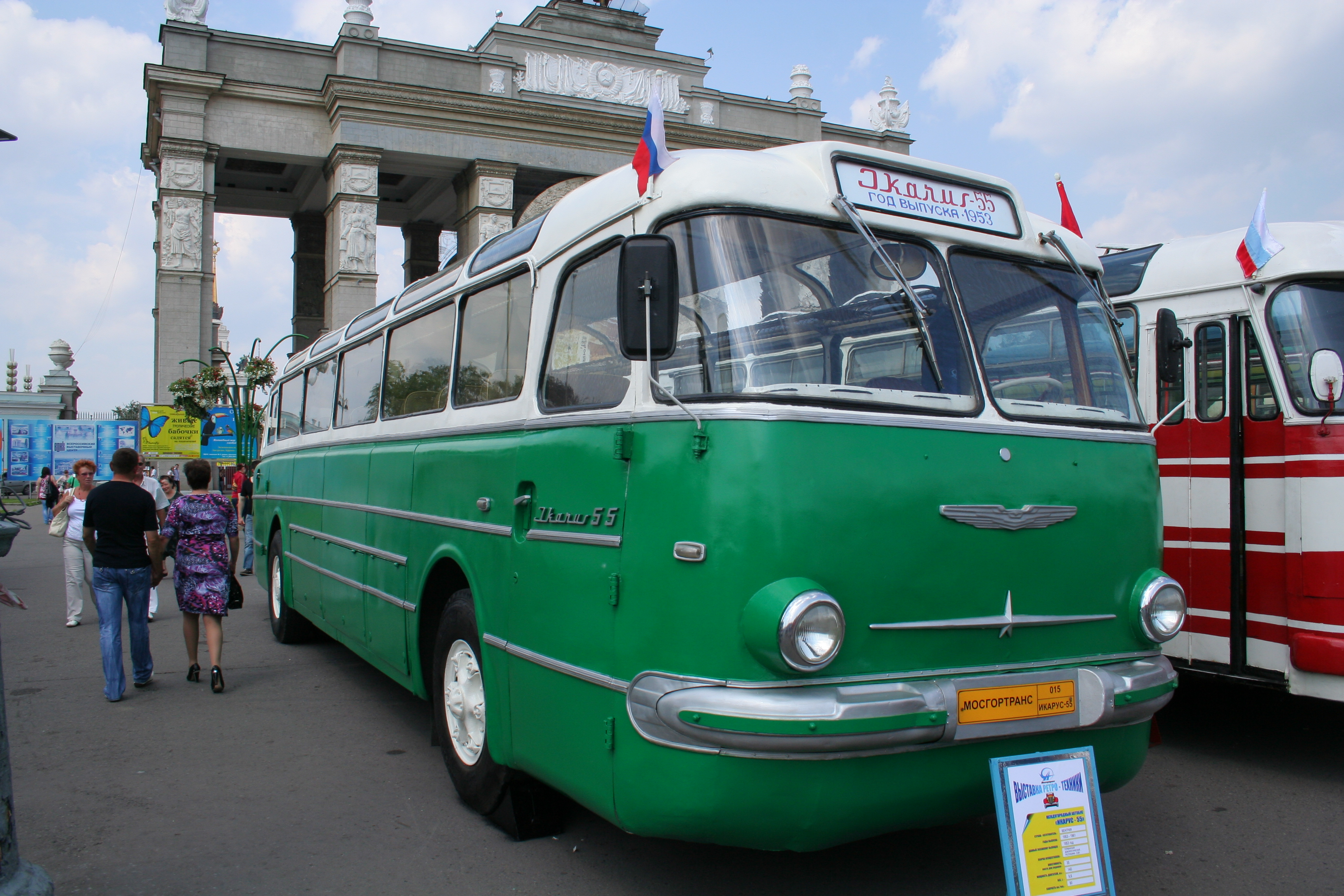 Ретро-автобус Икарус-55 Мосгортранса, 1953 года выпуска, на показе около ВВЦ 12 июня 2010 года.